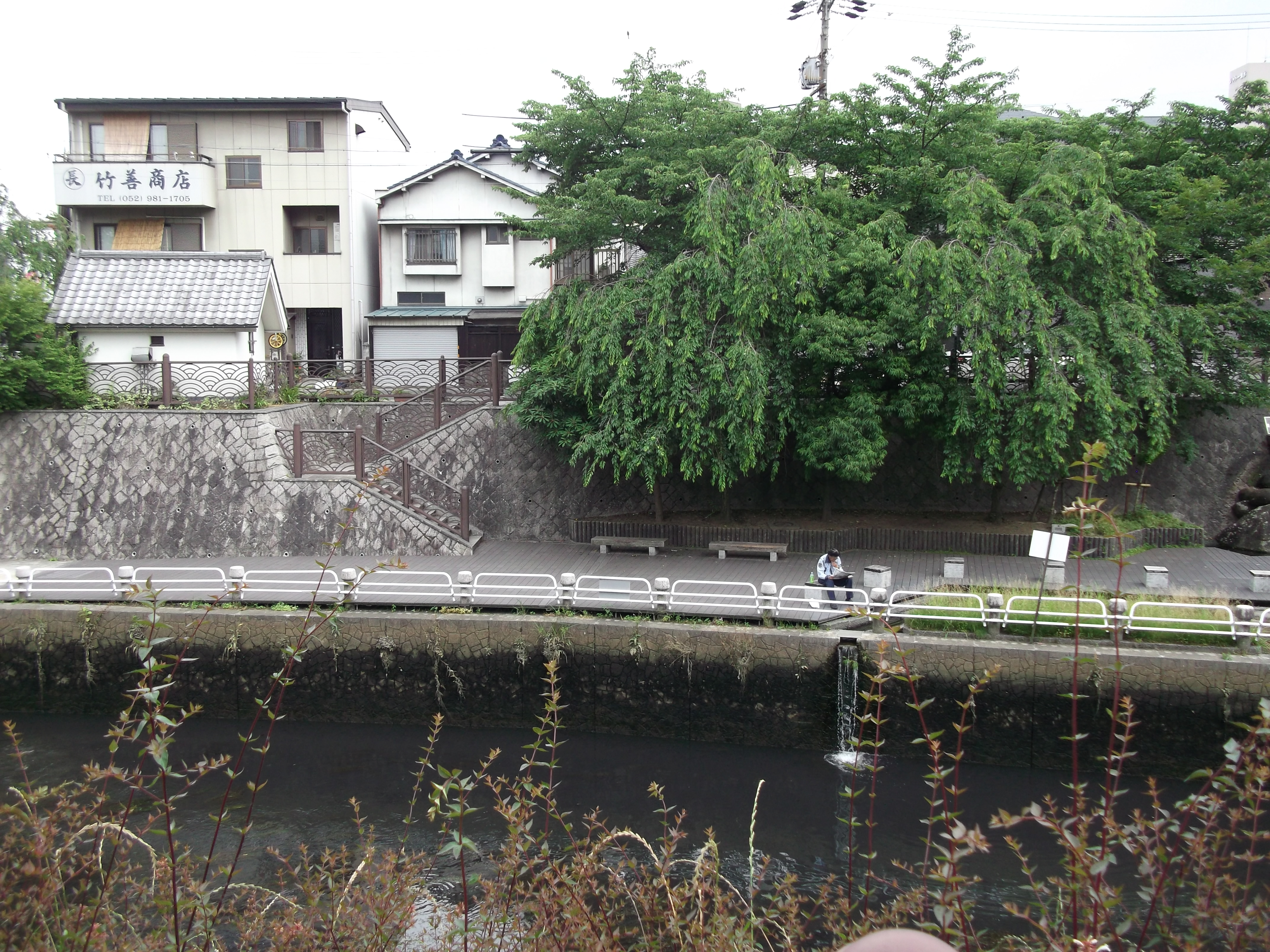 名古屋市北区金作町5丁目の現存部分全景（北清水親水広場）を愛知県道102号上から南側を写す。